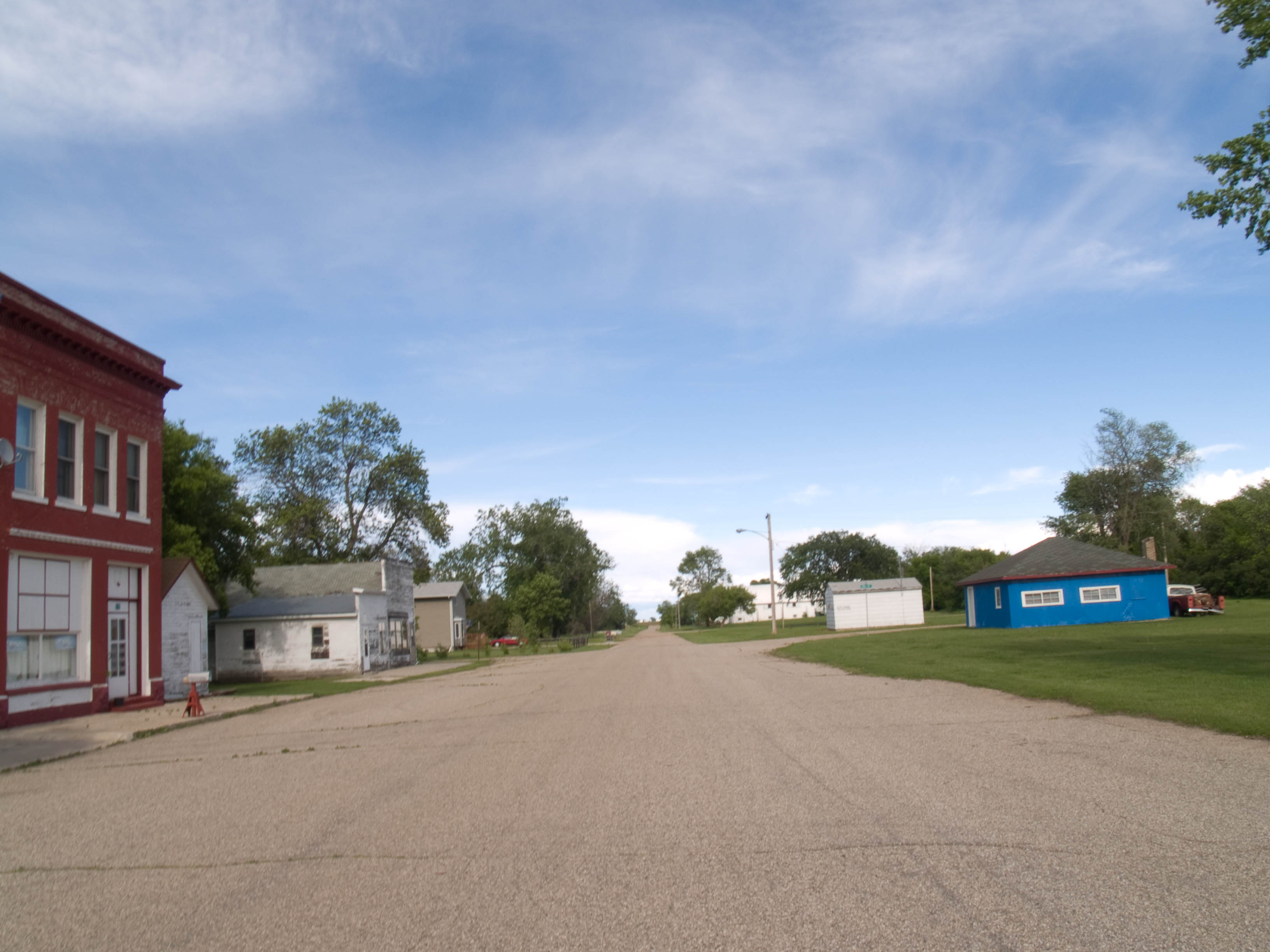 Monango, North Dakota